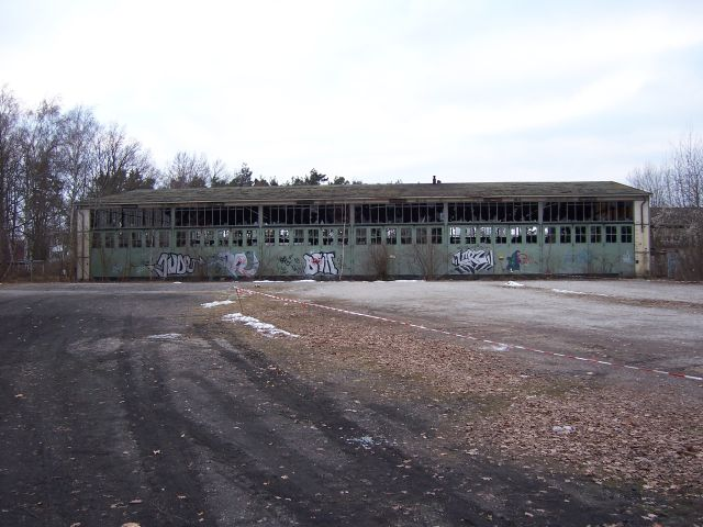 KBw Nürnberg